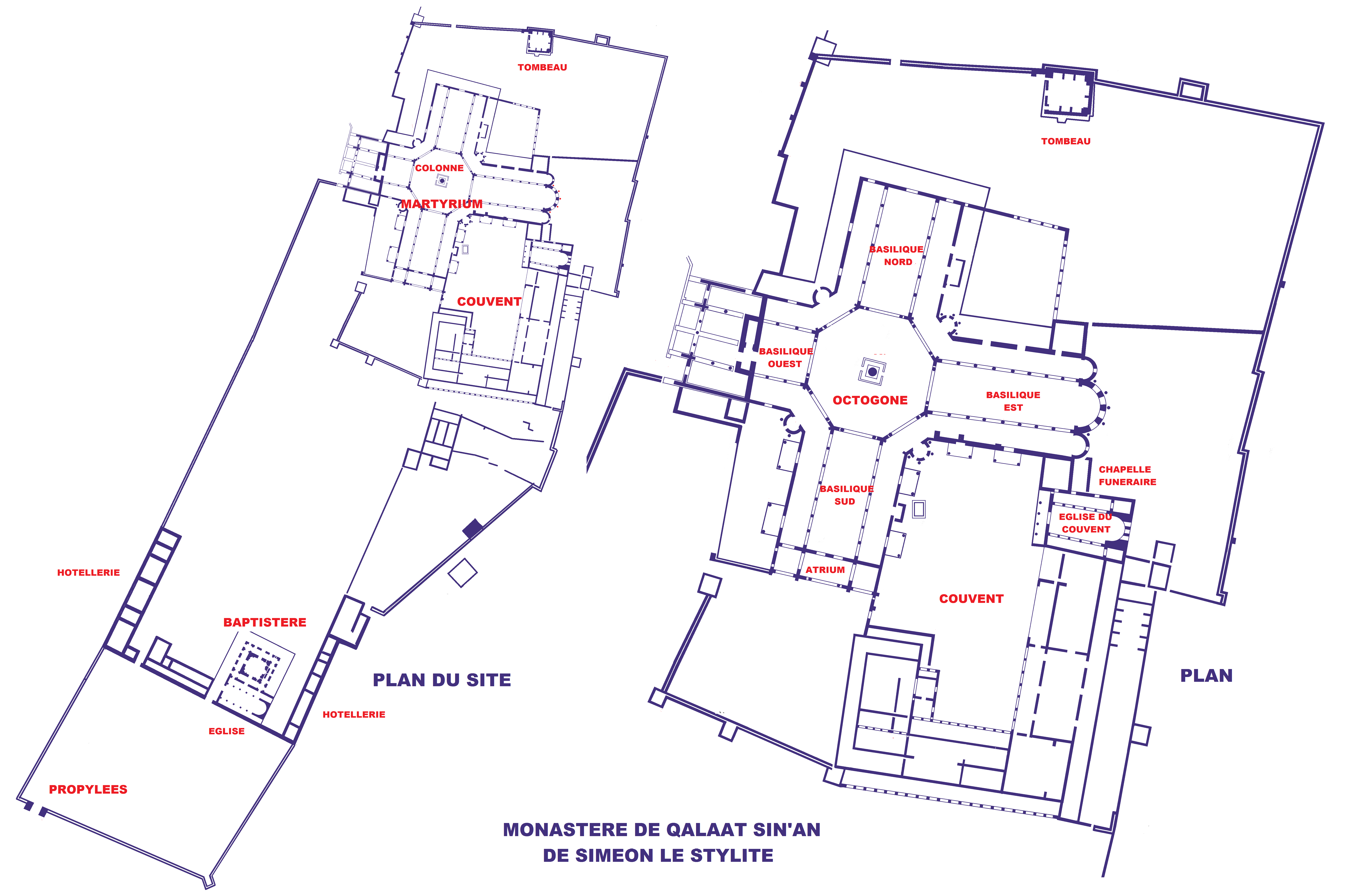 Monastère deQualaat Sin'an (Saint-Siméon le Stylite), Syrie, Plans